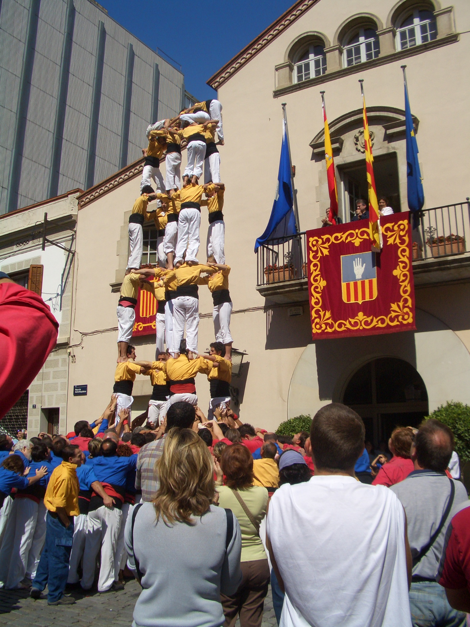 Cinc de Set de la Colla Castellera Bordegassos de Vilanova i la Geltrú